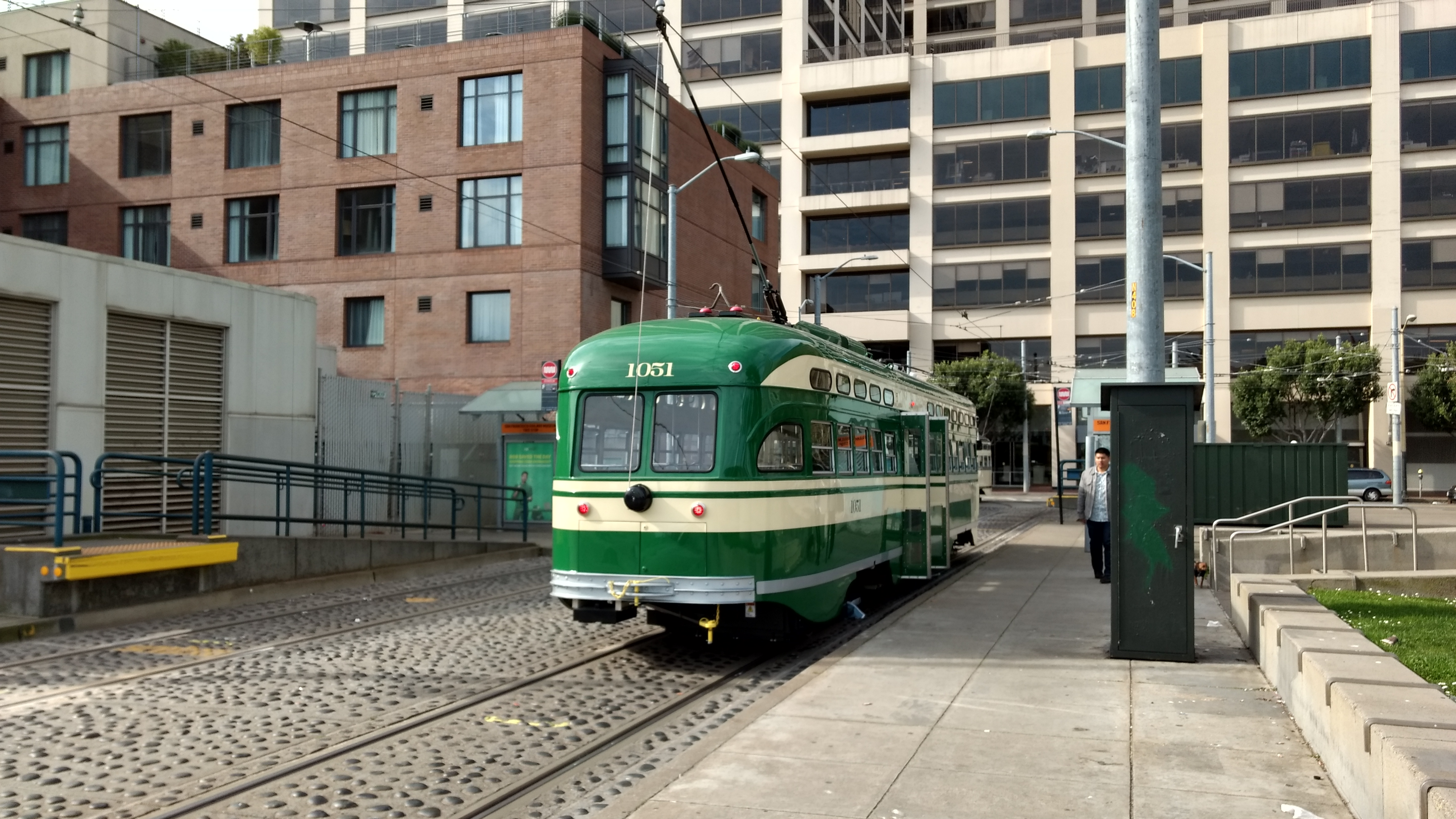 IMG_20170319_101752130_HDR